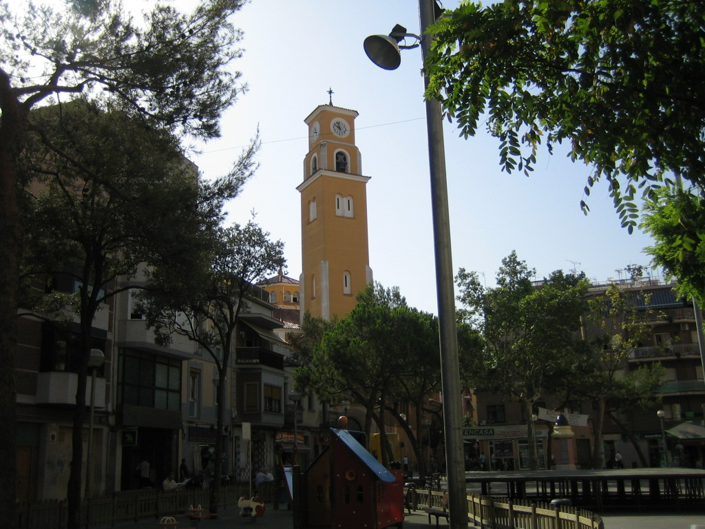 Foto hecha por mi desde la avenida torrente gornal hacia el este, el viernes 15 de Julio del 2005 a las 08:55 de la mañana. Con la cámara CANON ixus 40